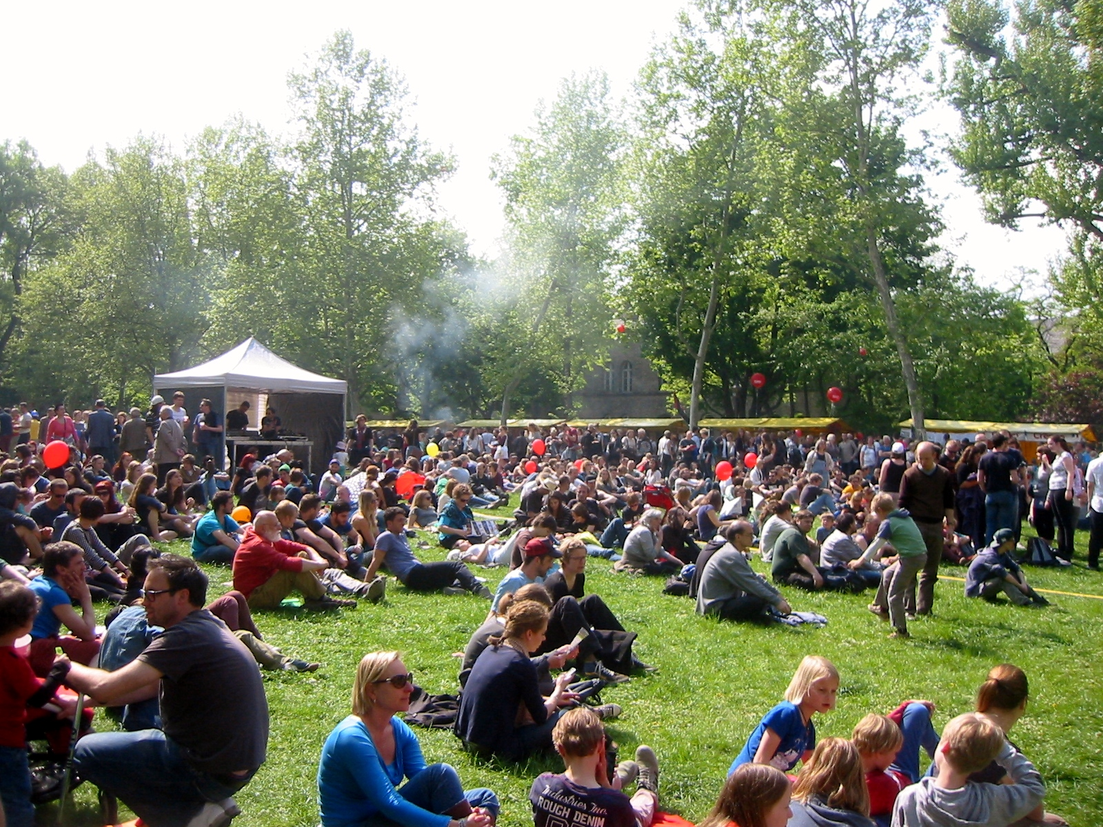 Impression vom Mariannenplatz auf dem MyFest 2014 in Kreuzberg